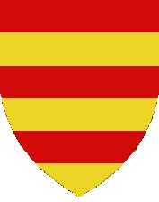 Io ho disegnato questo stemma su "Paint". Vi è raffigurato lo stemma degli Amidei.